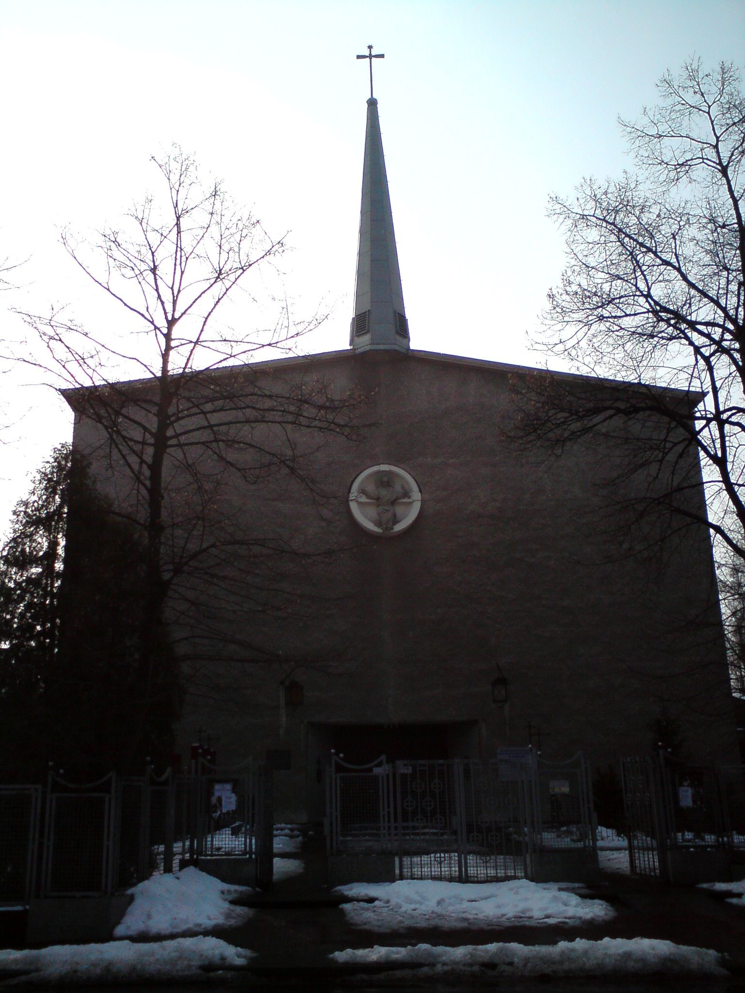 Kościół Podwyższenia Krzyża Świętego w Warszawie